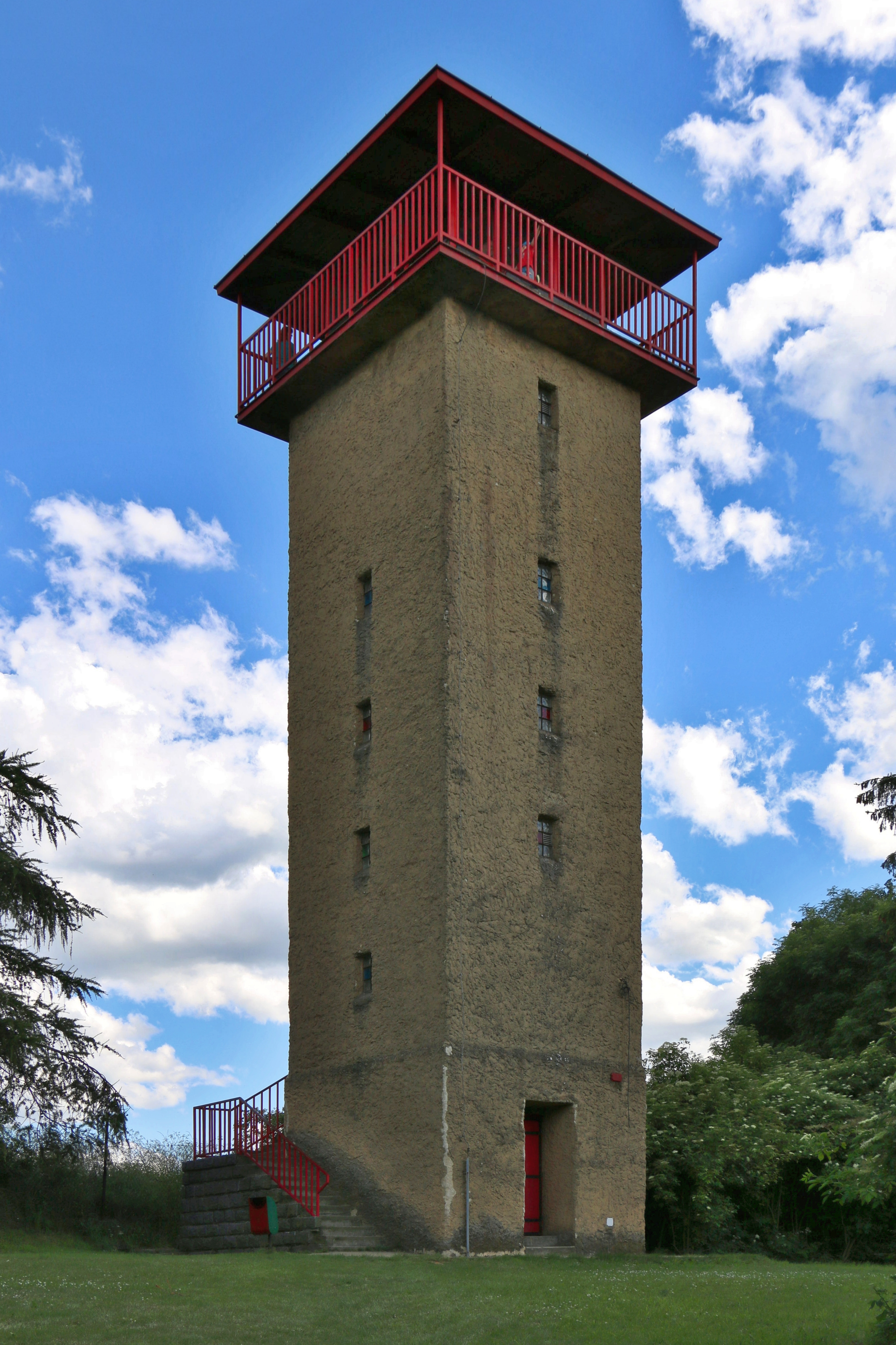 Burianova rozhledna z 18.6.2016